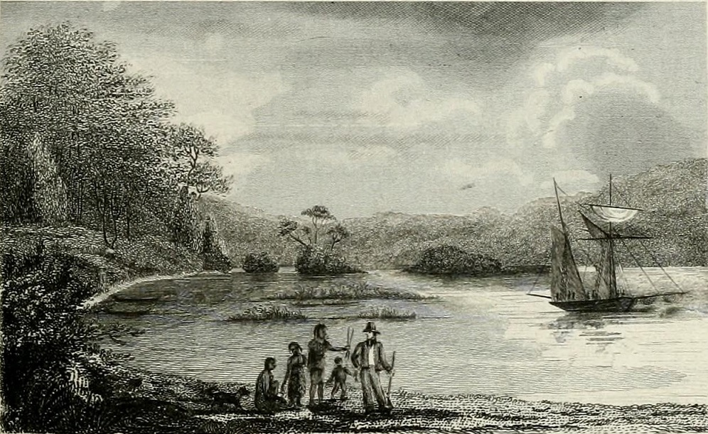 Estrecho de Magallanes 1827 durante la expedición del almirante Phillip Parker King, tomado del libro "Narrative of the surveying voyages of His Majesty's Ships Adventure and Beagle between the years 1826 and 1836, describing their examination of the southern shores of South America, and the Beagle's circumnavigation of the globe. Proceedings of the first expedition, 1826-30, under the command of Captain P. Parker King, R.N., F.R.S. London: Henry Colburn"